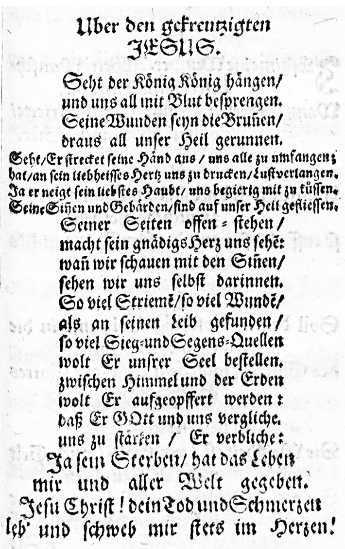 Catharina Regina von Greiffenberg, "Über den gekreuzigten Jesus", Druck, aus: Geistliche Sonnette/ Lieder und Gedichte. Nürnberg 1662, S. 403 [1]